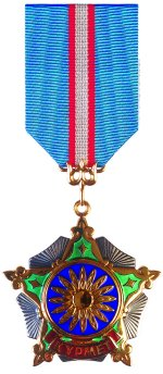 Order of Kurmet